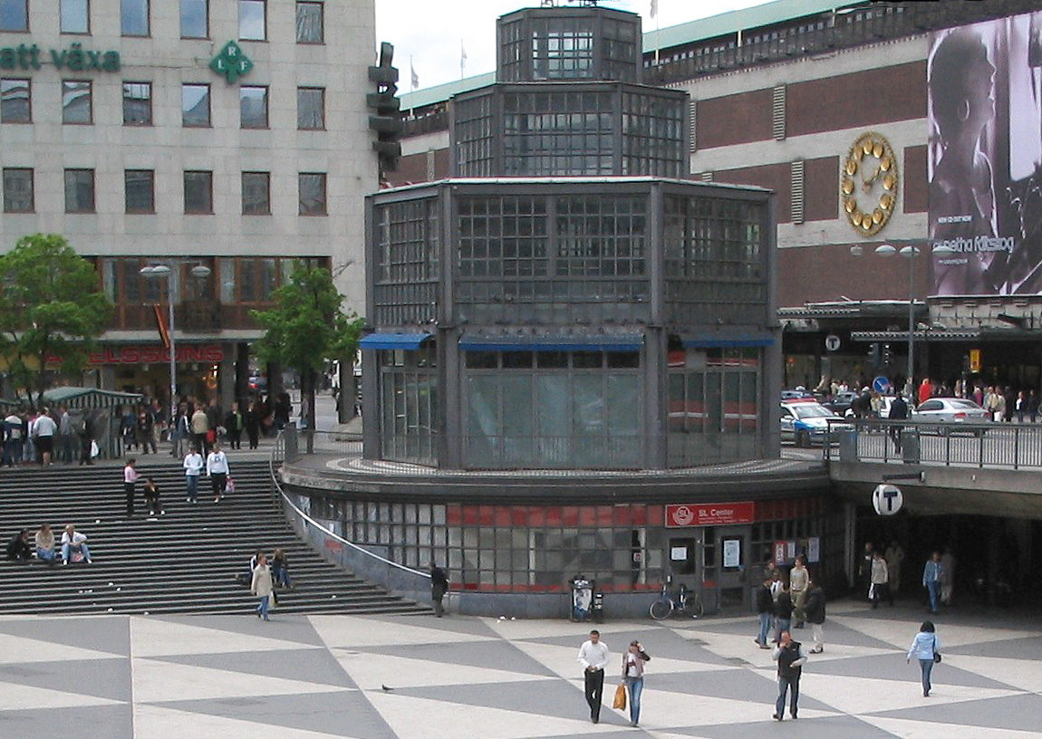 Café Muttern vid Sergels torg (riven augusti 2004)